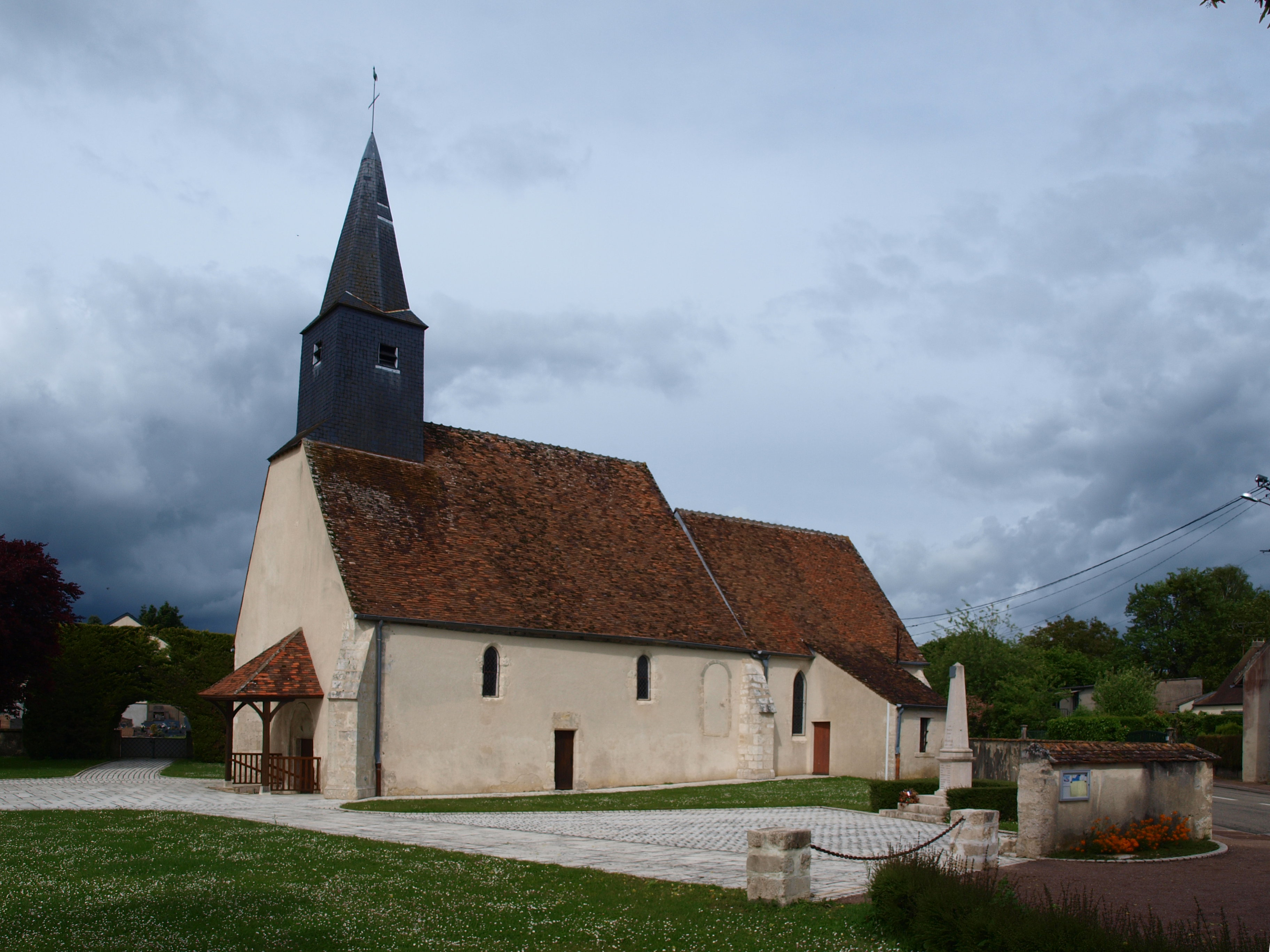 Paucourt (Loiret, France)